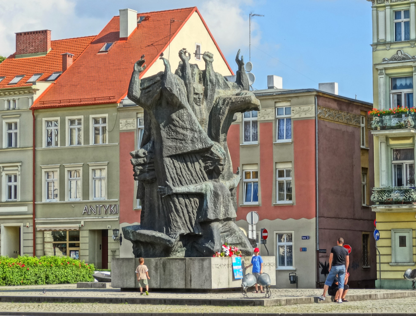 Pomnik Walki i Męczeństwa Ziemi Bydgoskiej na Starym Rynku w Bydgoszczy (autor Franciszek Masiak, 1969)